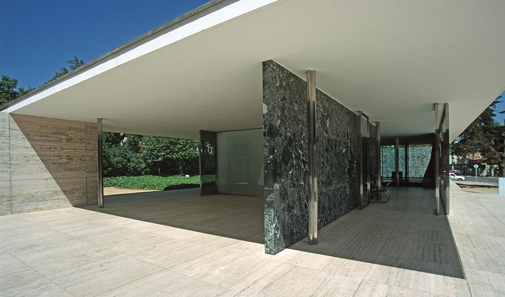 Barcelona, Deutscher Weltausstellungspavillon 1929 (Rekonstruktion), Detail 2, Architekt: Mies van der Rohe